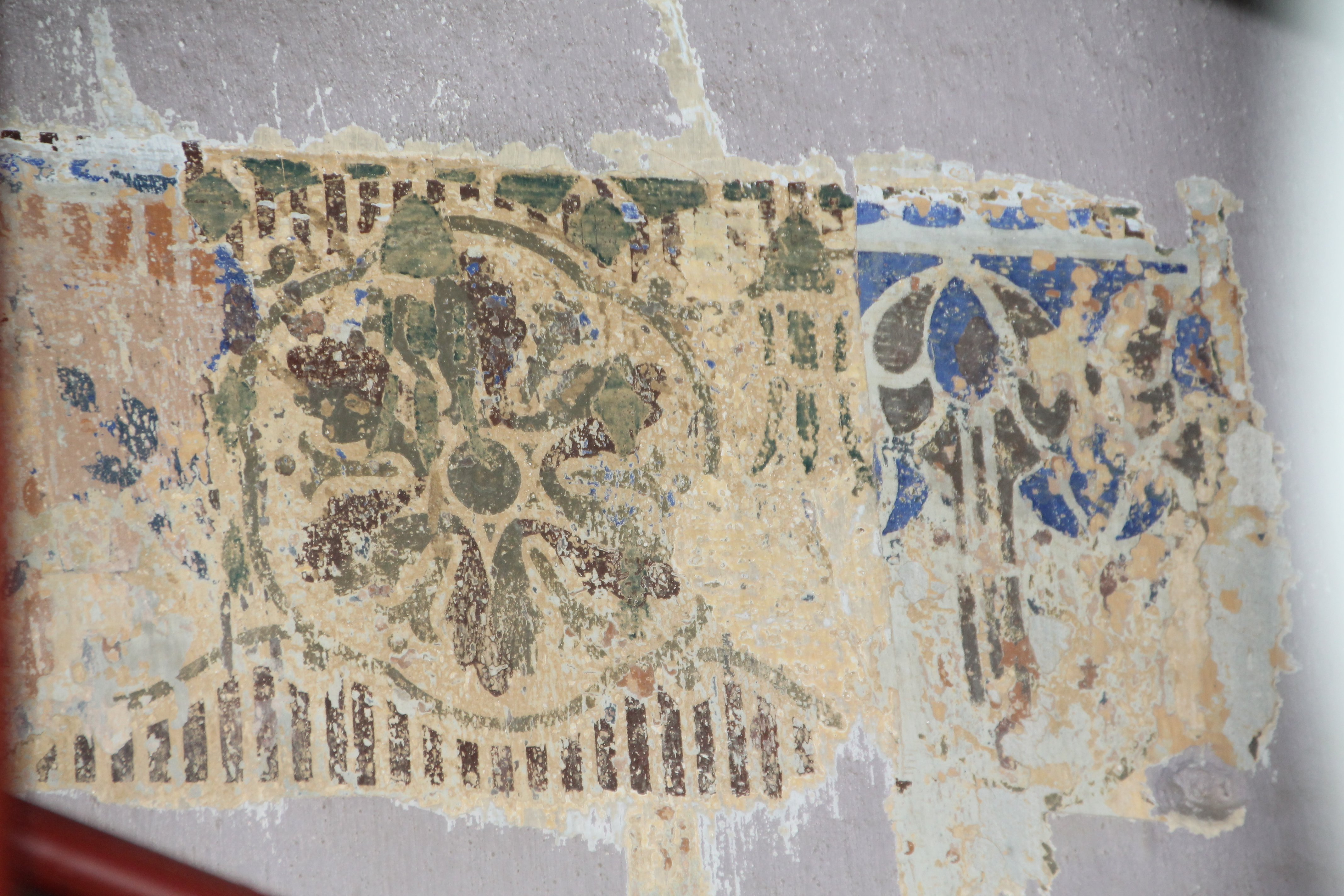 ציור קיר בבית הכנסת אוהל יצחק ת"א